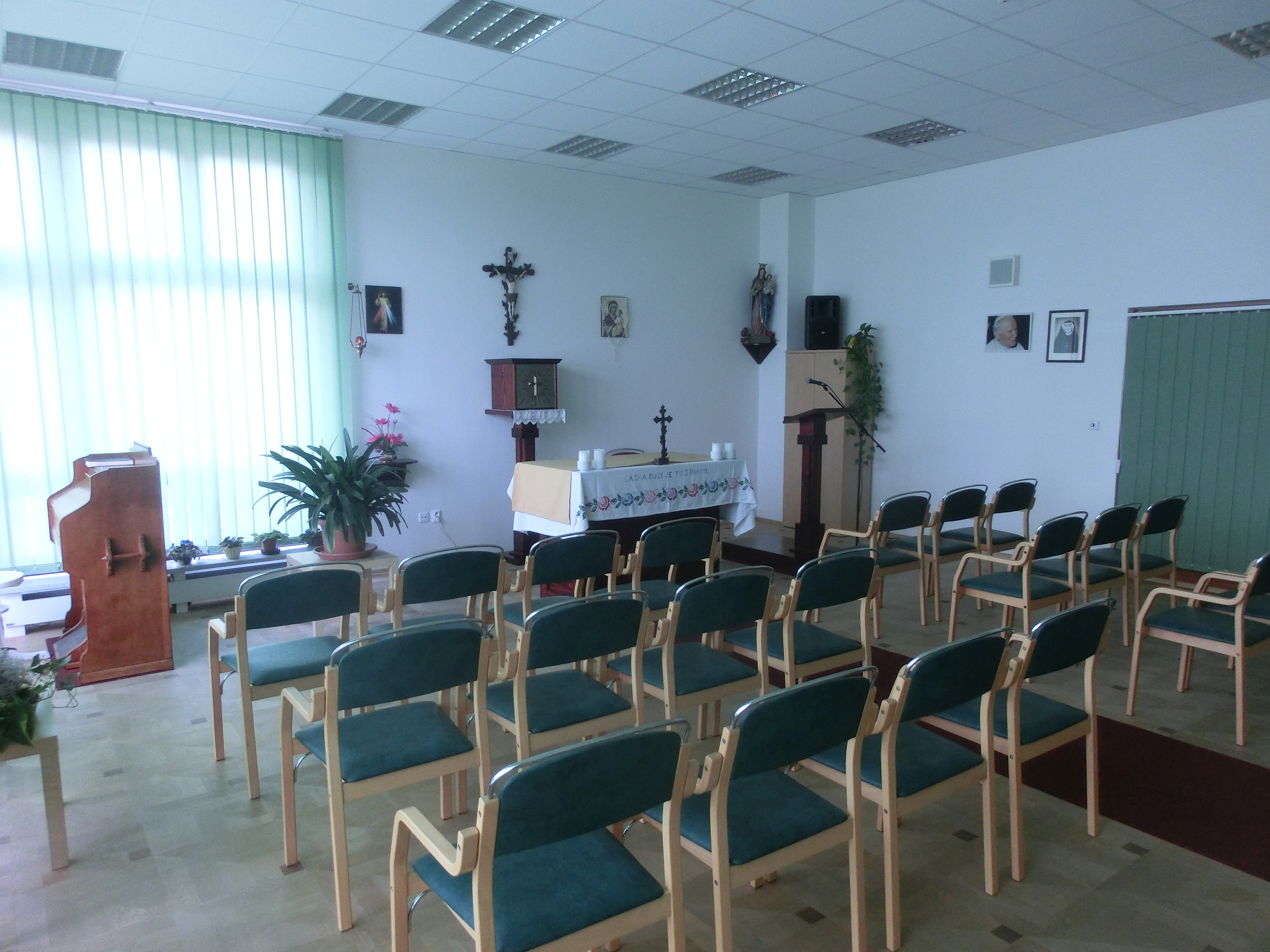 Kaple Božího Milosrdenství v Domě pro seniory, Litoměřice